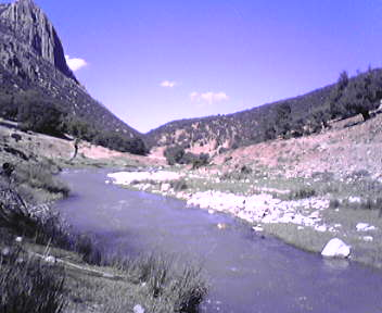 licence:GFDL Photo:Hadraj Said prise à Immouzer Marmoucha pres de Tahmamoucht